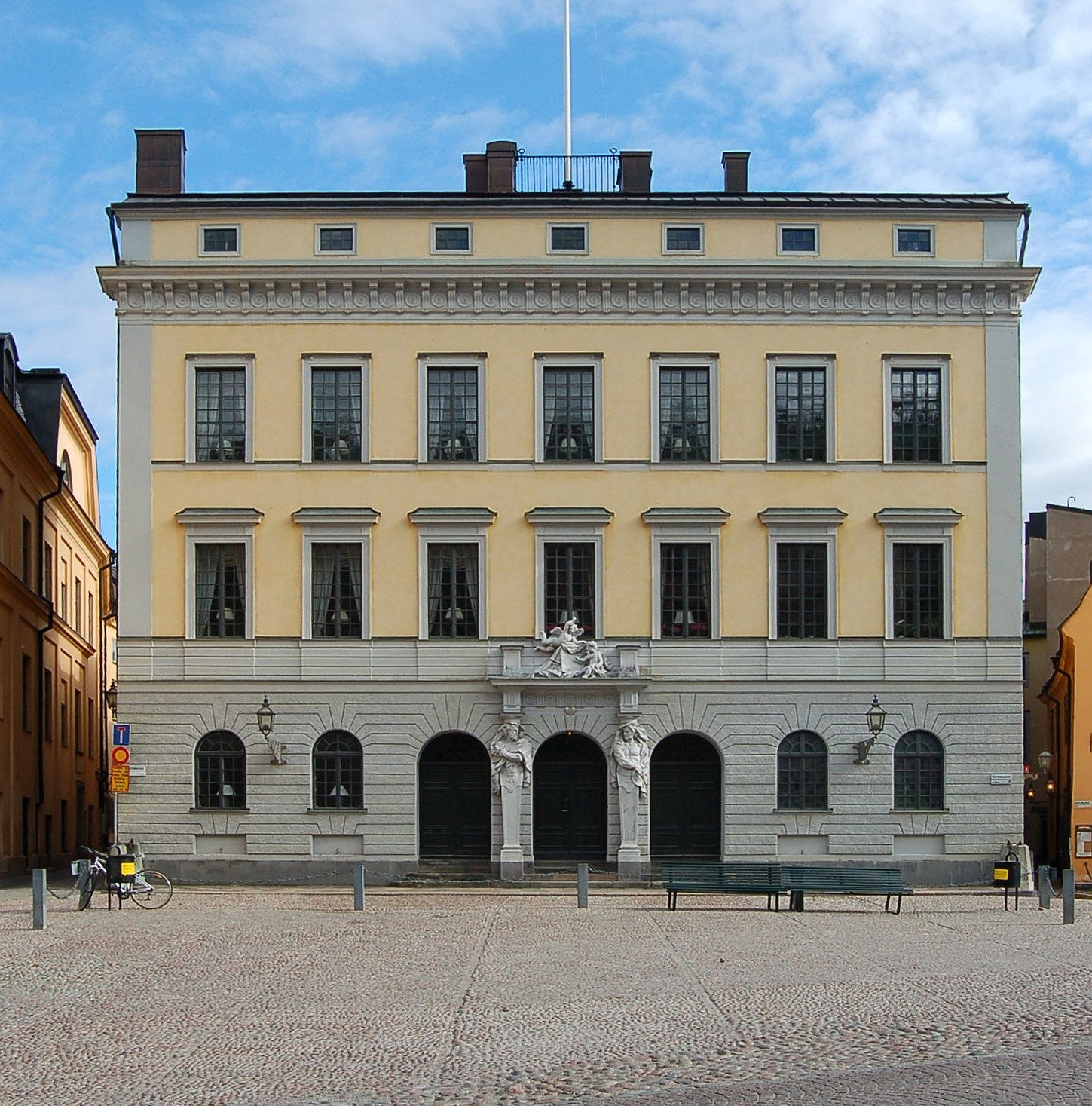 Tessinska palatset, Gamla stan i Stockholm